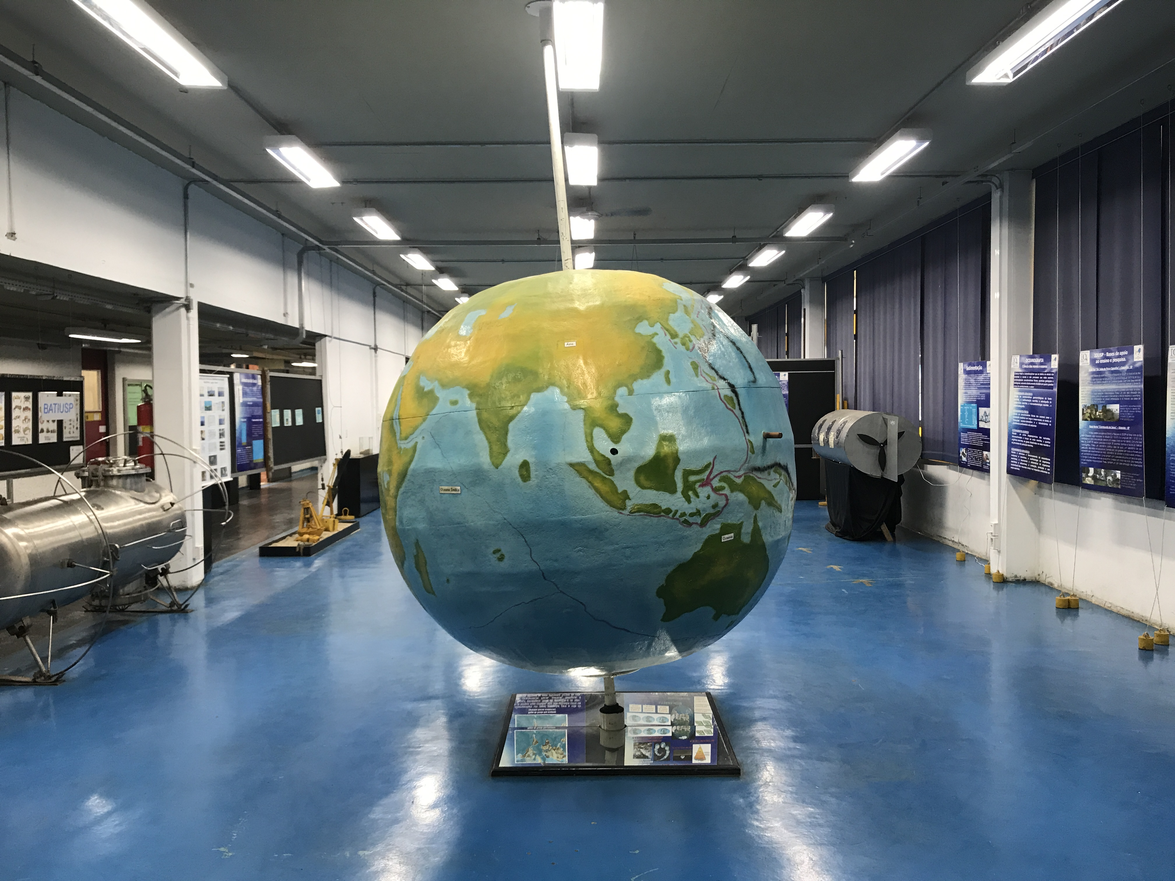 Vista da porta de entrada do museu.